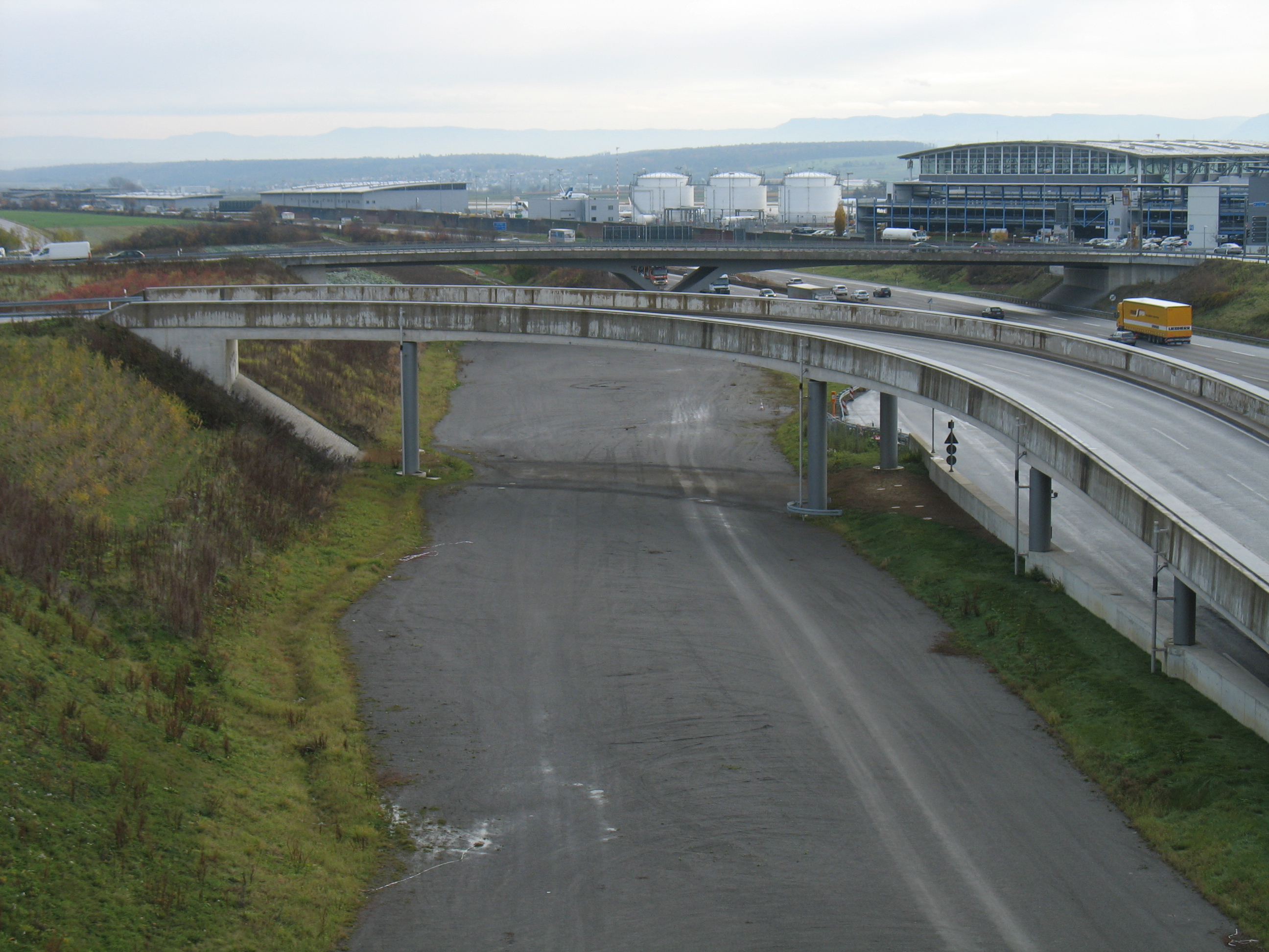 Filderebene im Bereich der Messe Stuttgart. Nördlich (links) der Bundesautobahn 8 ist die für die zukünftige Eisenbahn-Neubaustrecke Stuttgart–Wendlingen(–Ulm) freigehaltene Trasse zu erkennen.